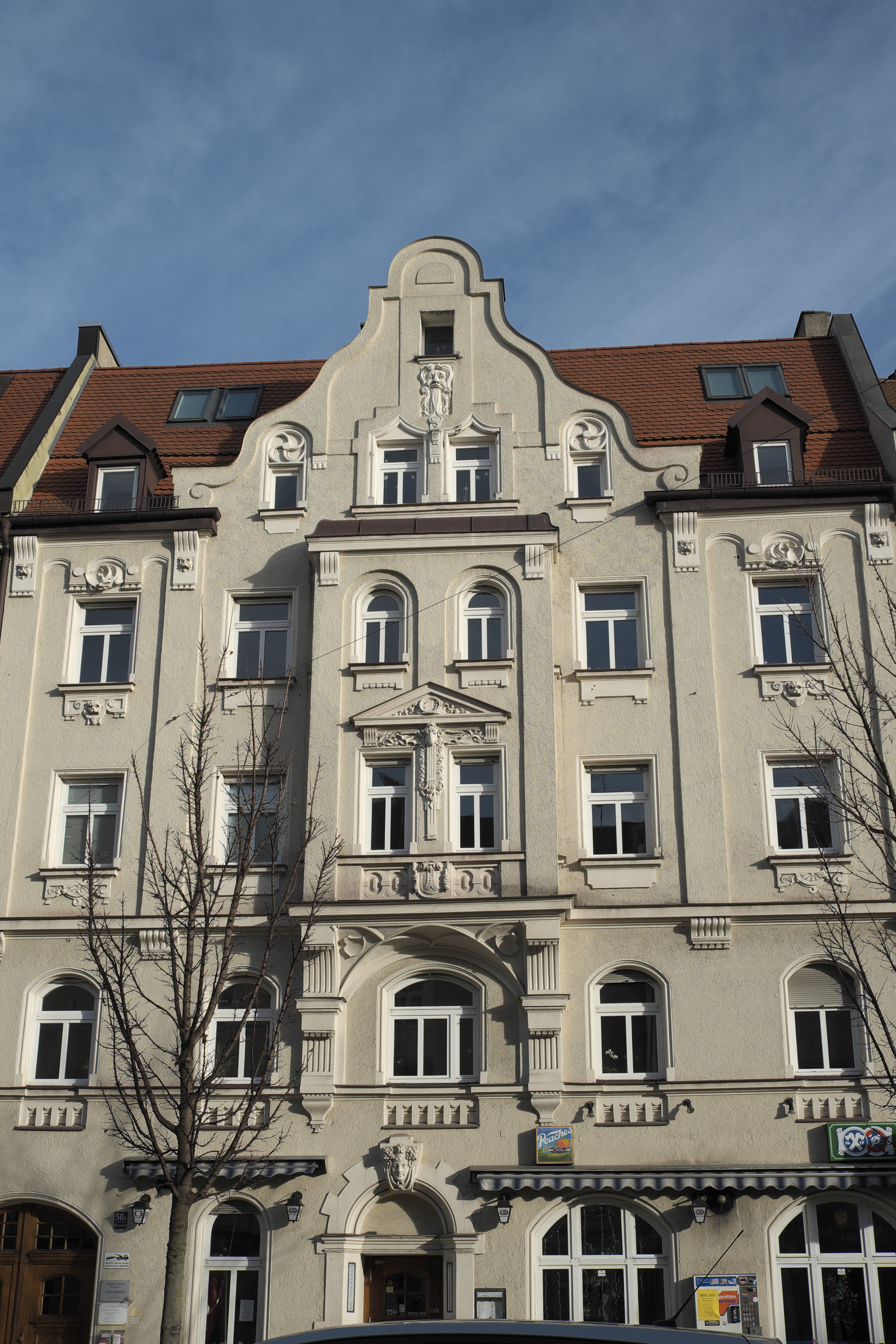 Mietshaus in der Donnersbergerstraße 50a in Neuhausen im Stadtbezirk Neuhausen-Nymphenburg in München (Bayern/Deutschland), um 1900